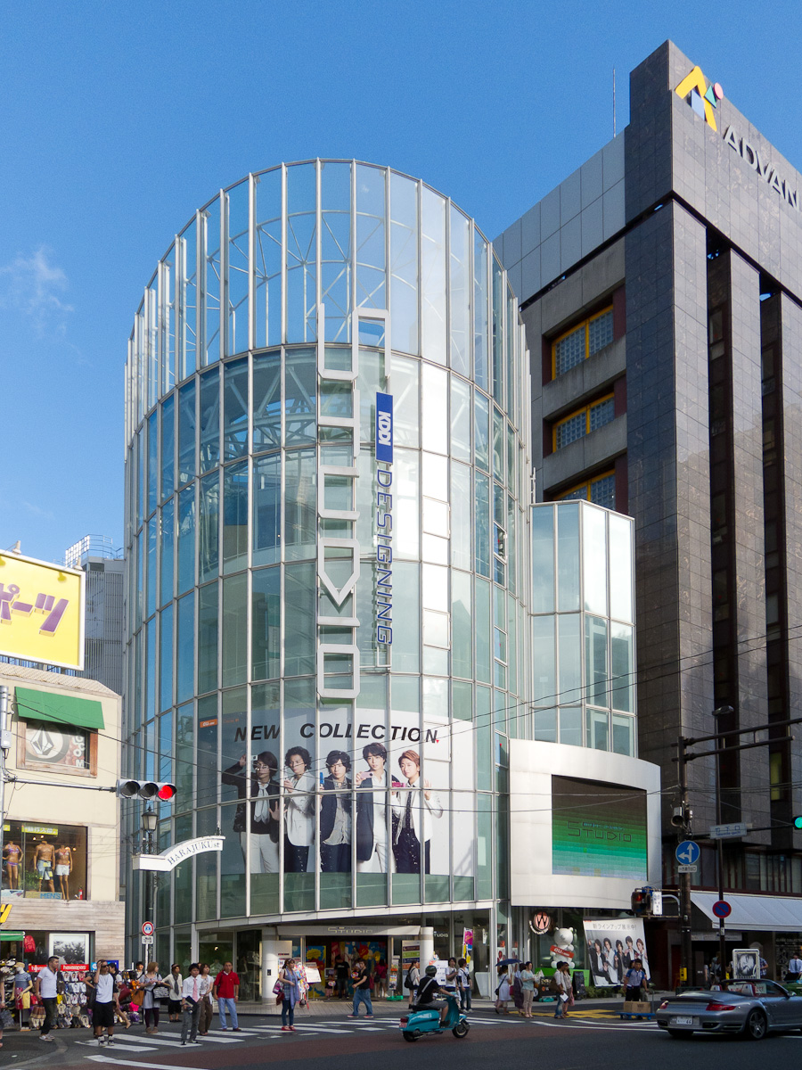 KDDI Designing Studio、東京都渋谷区神宮前4丁目。